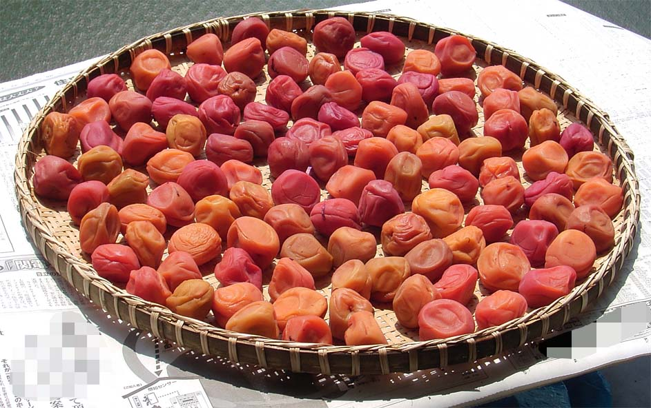 家庭において伝統的製法で作られる梅干しを土用干ししているところ。干し始めで皺が少ないが、日を経るにつれて水分が抜け皺が寄ってくる。